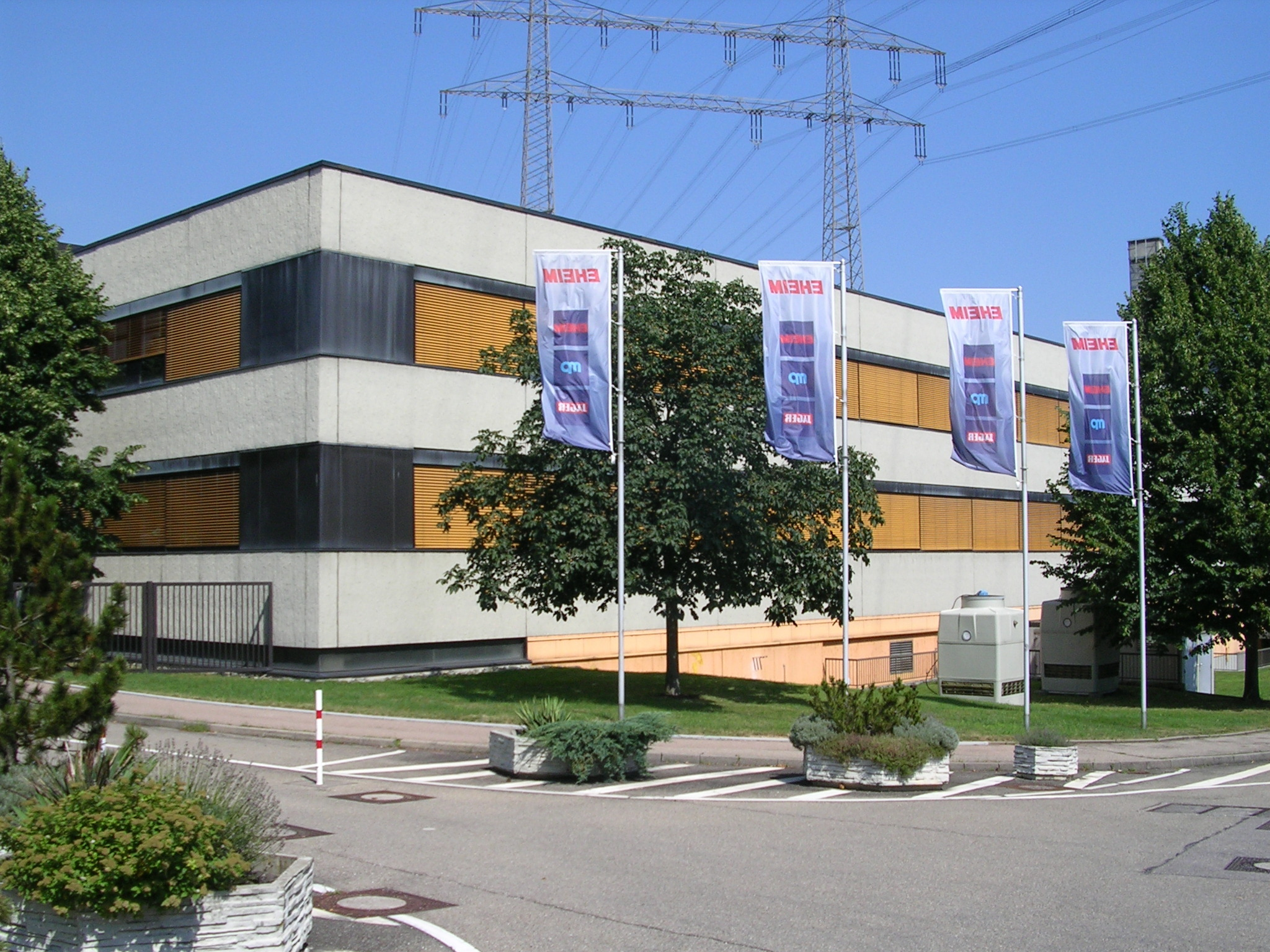 Eheim in Deizisau (Germany)